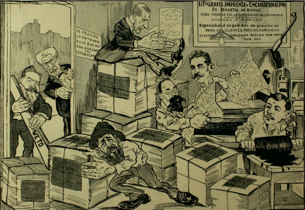 Caricatura sobre la emision monetaria en el gobierno de Pedro Montt